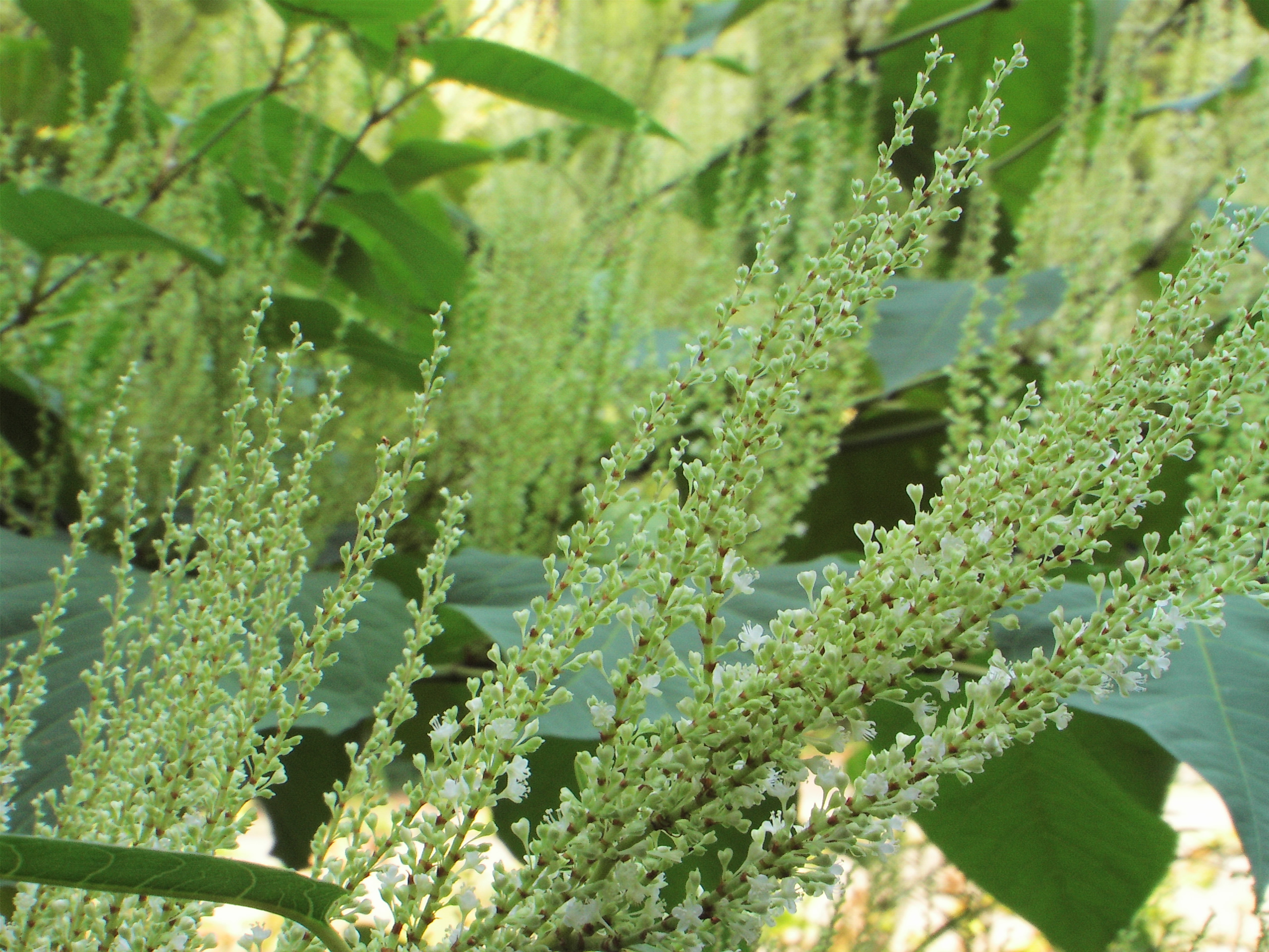 Velocicaptor